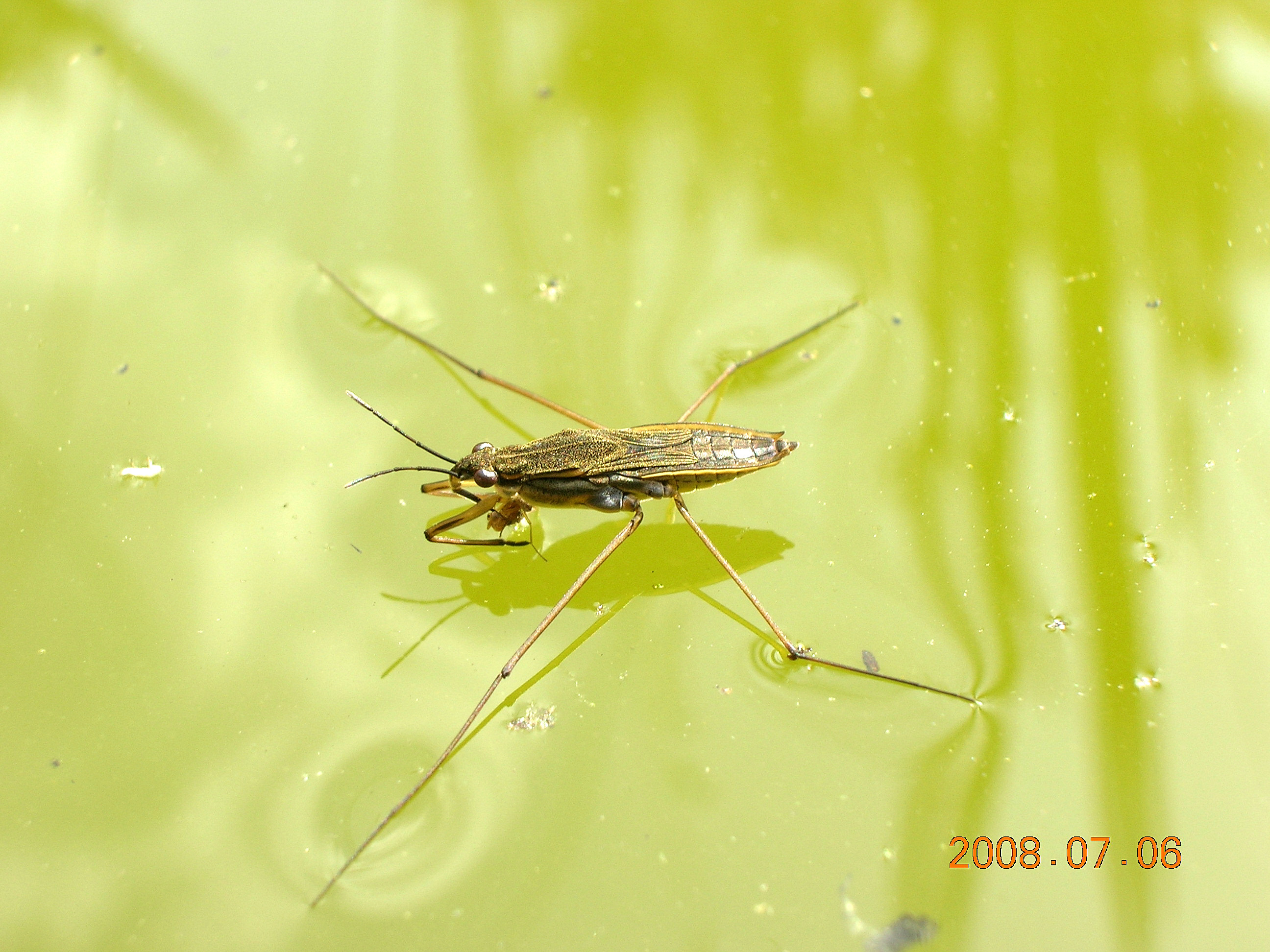 Nartnik Duży (Gerris lacustris) ze zdobyczą na tafli wody. Mazowieckie, Polska.